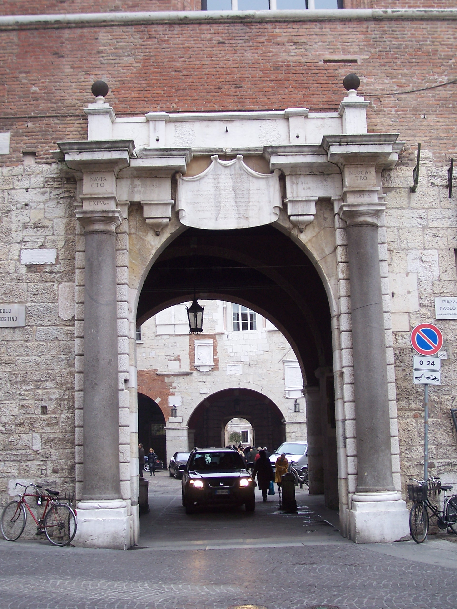 è il portale del broletto di brescia